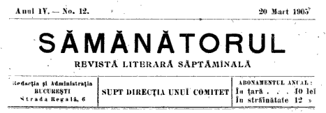 Sămănătorul logo for issue no. 12, dated March 20, 1906